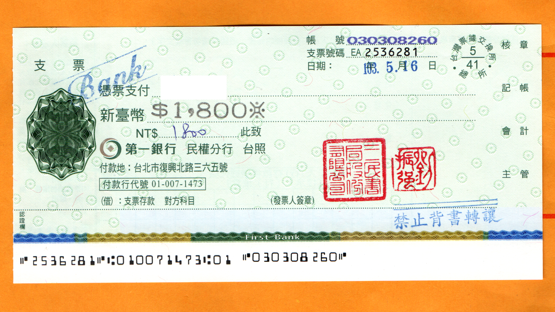 2014年5月16日，三民書局開立的第一商業銀行新臺幣1800元支票正面。